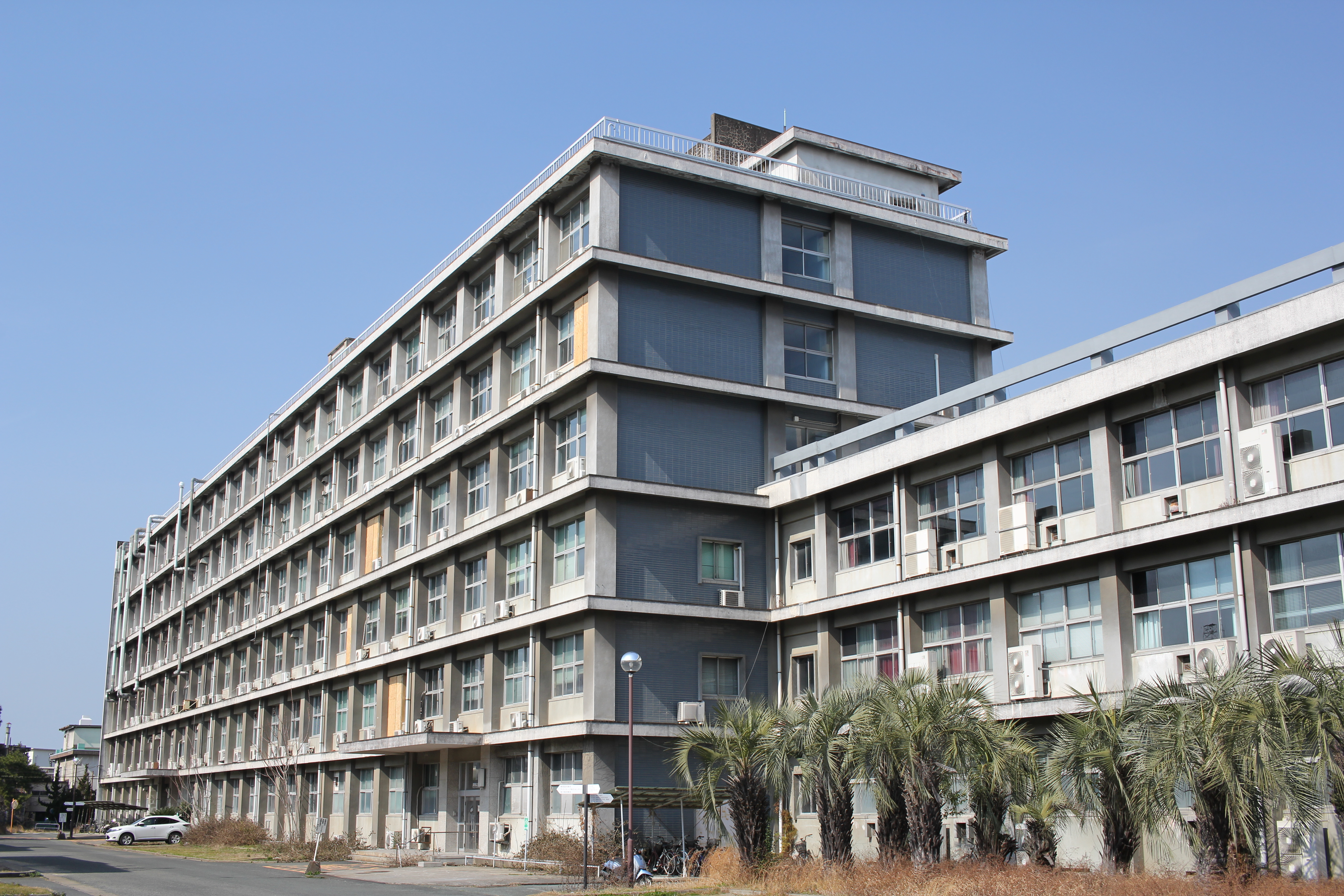 九州大学箱崎キャンパス旧理学部2号館 Canon EOS 60D